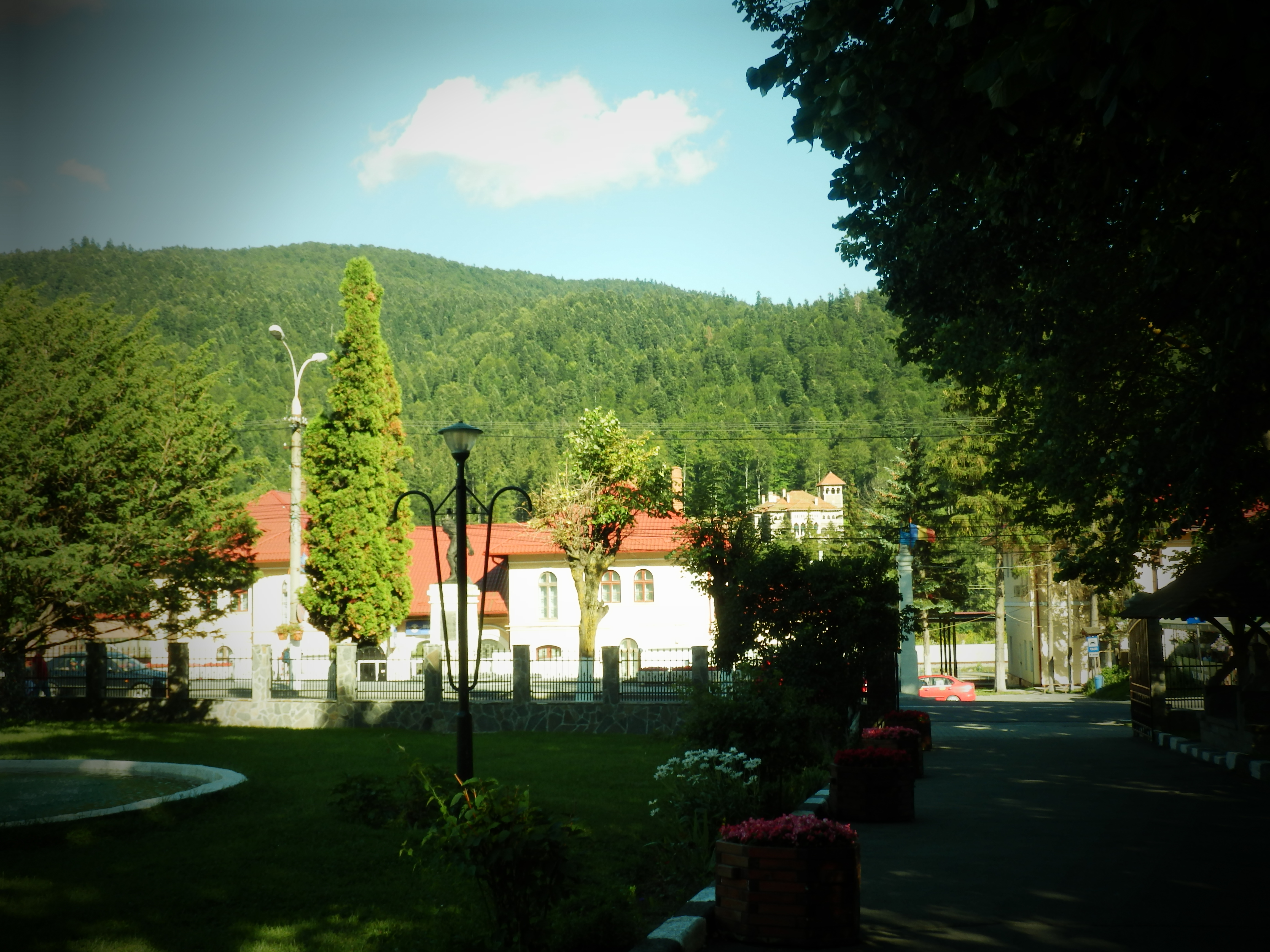 Prahova, România by Stefanjurca